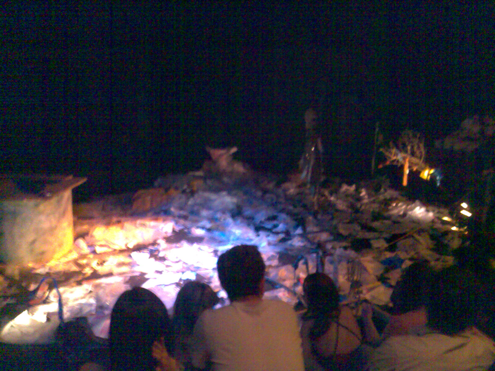 Категорія:Зображення:Театр «Крик»